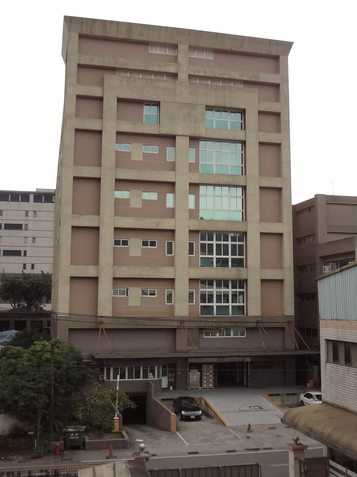 威聯通科技七堵廠，位於臺灣基隆市七堵區工建北路22號。